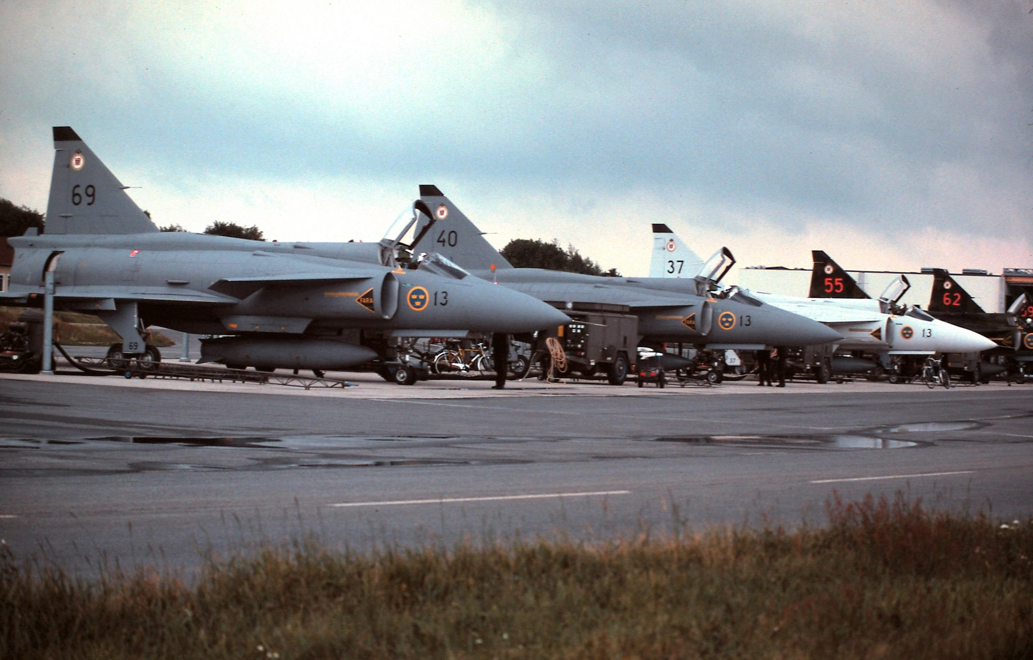 JA 37 Viggen vid F 13 Bråvalla tidigt 80-tal. Foto